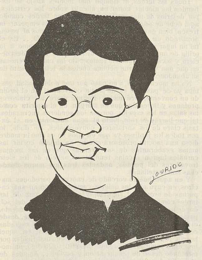 Alejandro Miguéns Parrado por Lourido, Suevia 1913